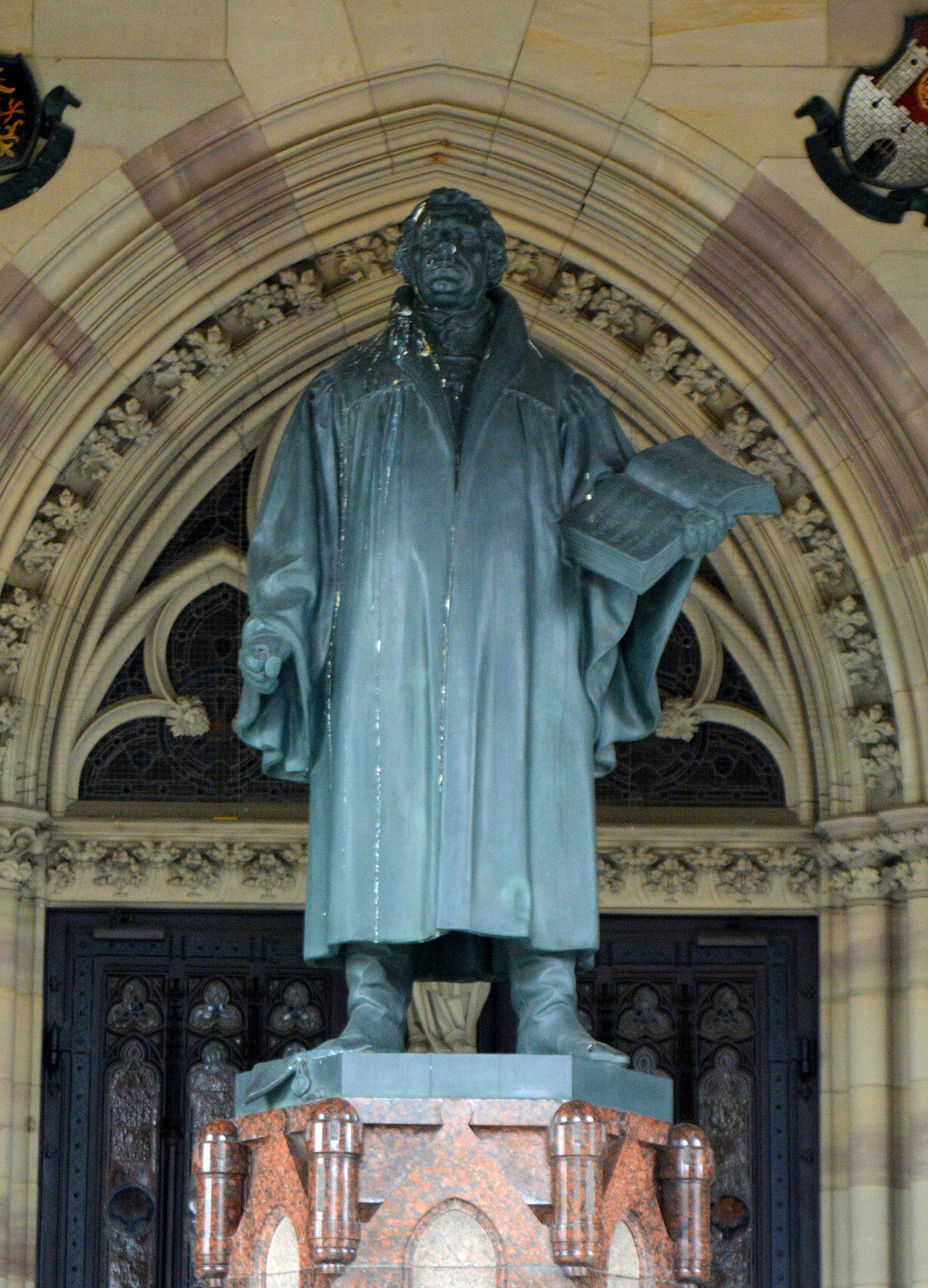 Maarten Luther, stânbyld by de Gedächtniskirche fan Spiers